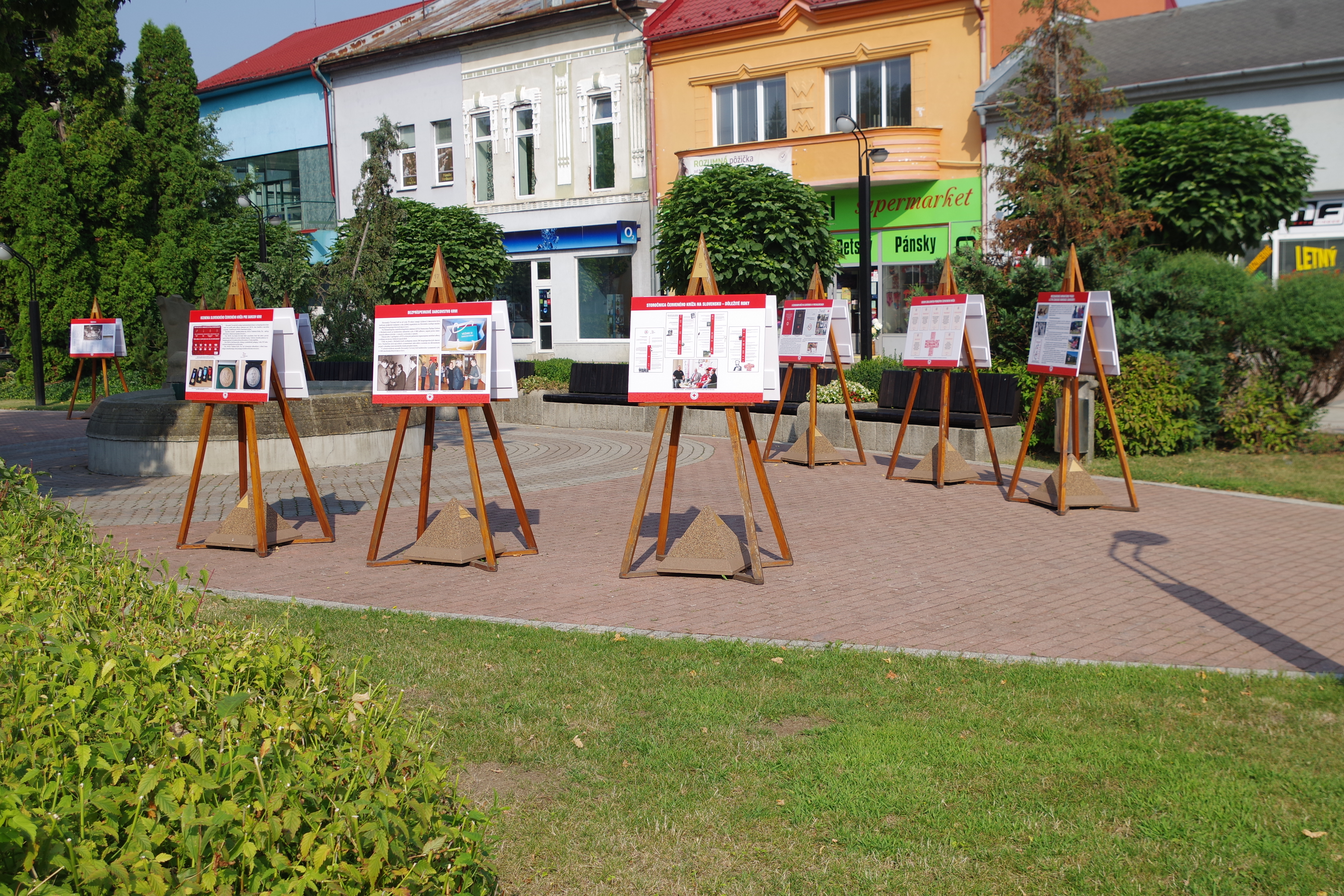 Galéria pod nebom na Námestí osloboditeľov